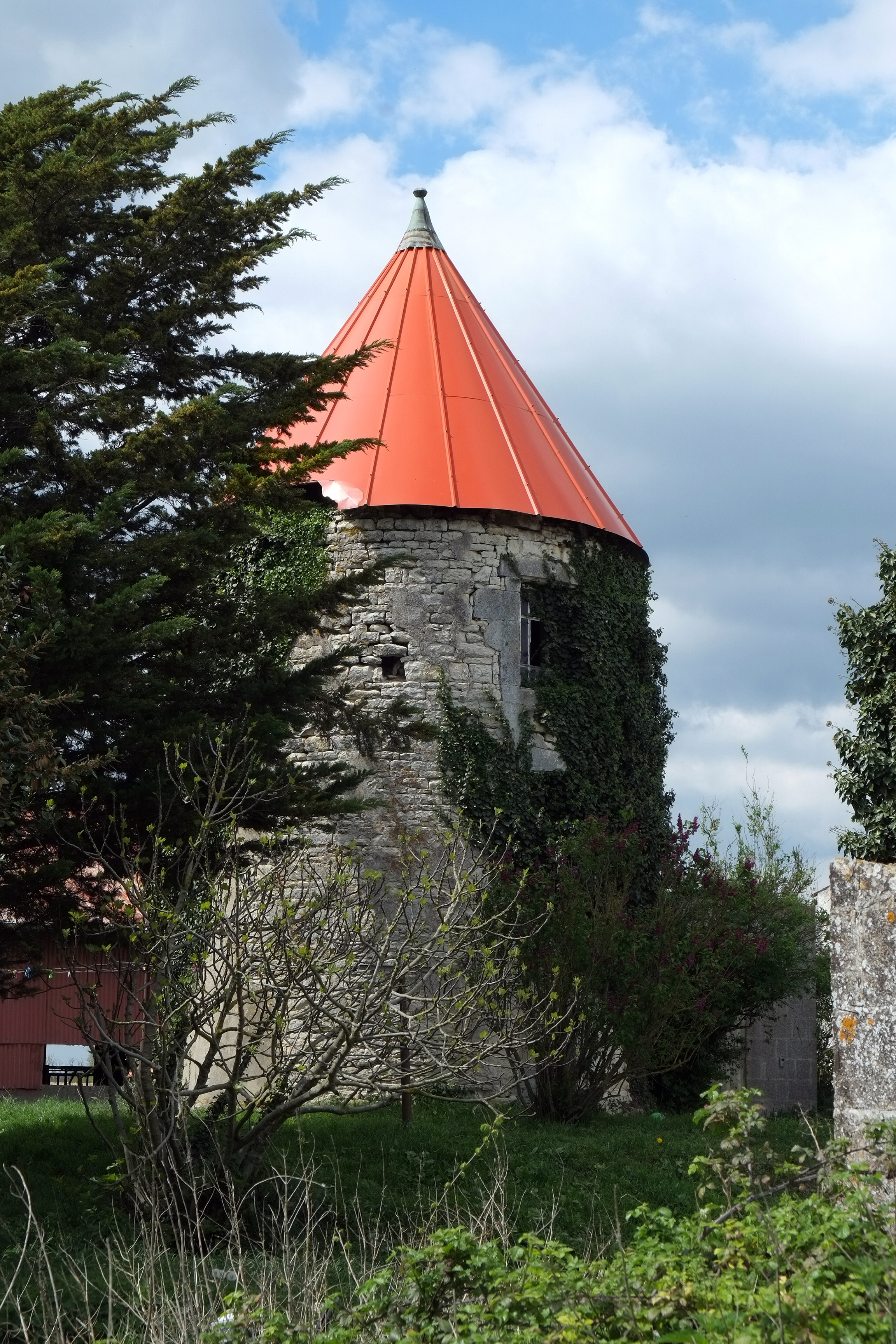 Moulin au toit de tôle rouge Angliers Charente-Maritime France